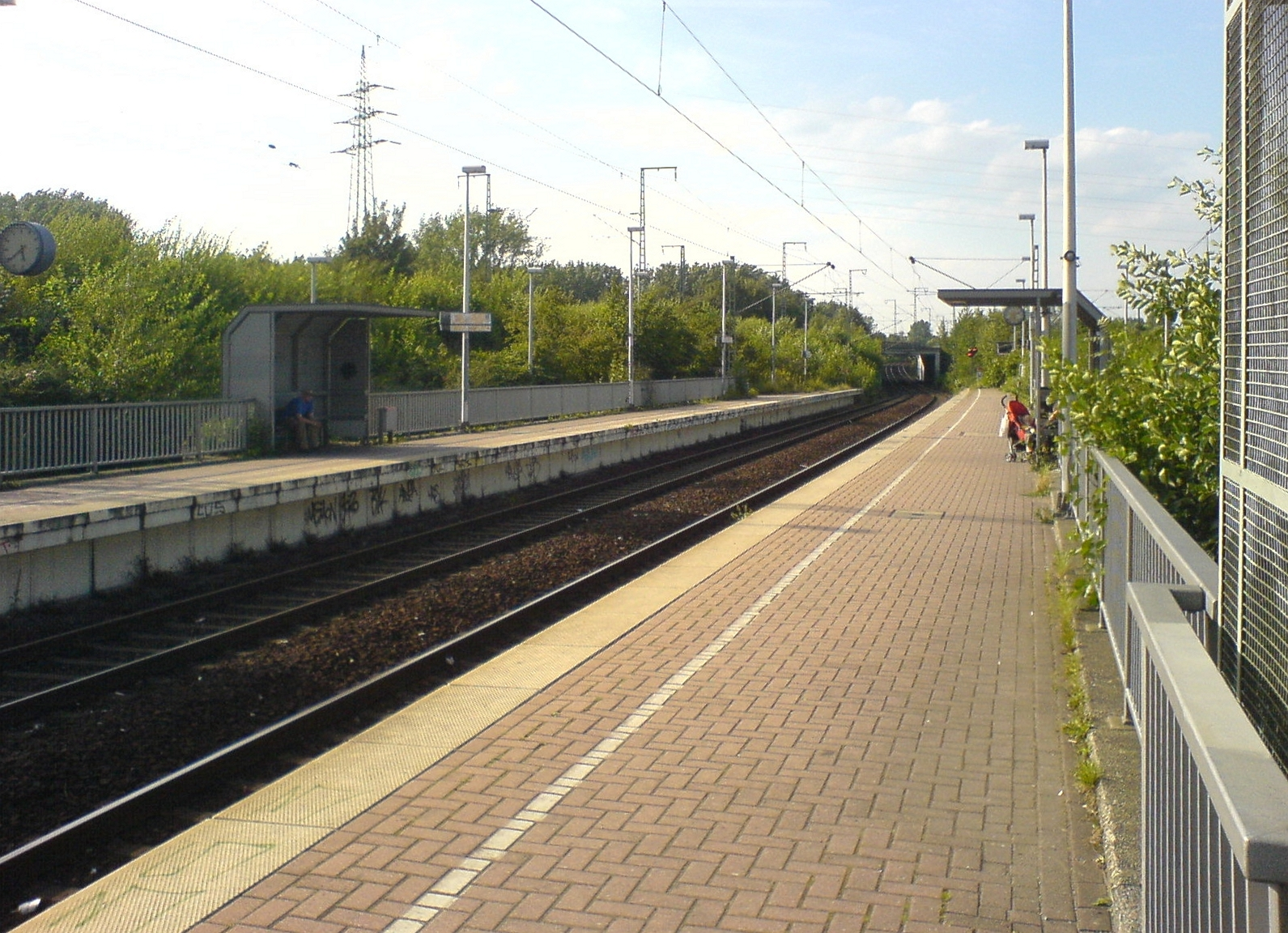 Bahnhof Dortmund-Wischlingen